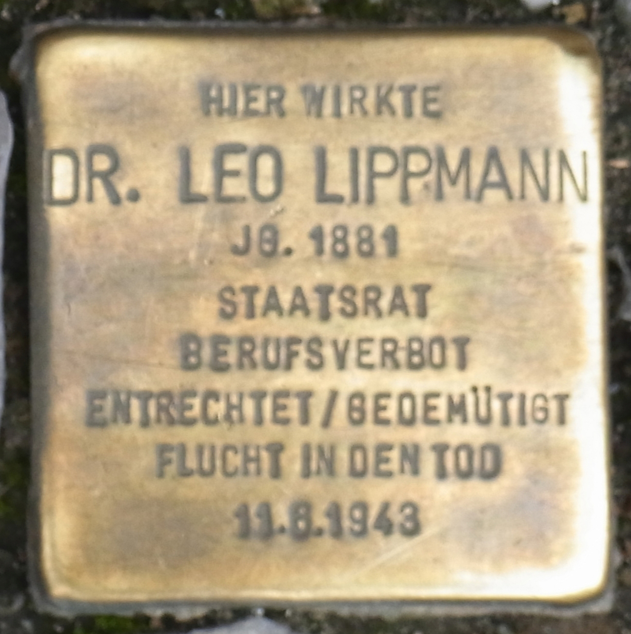 Stolperstein für Leo Lippmann vor der Finanzbehörde Hamburg, wo er 1933 Berufsverbot erhielt.